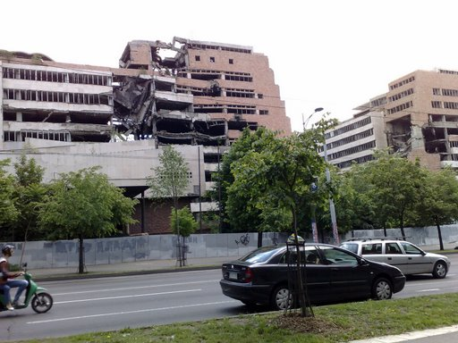 Damage Belgrade NATO bombings 1999